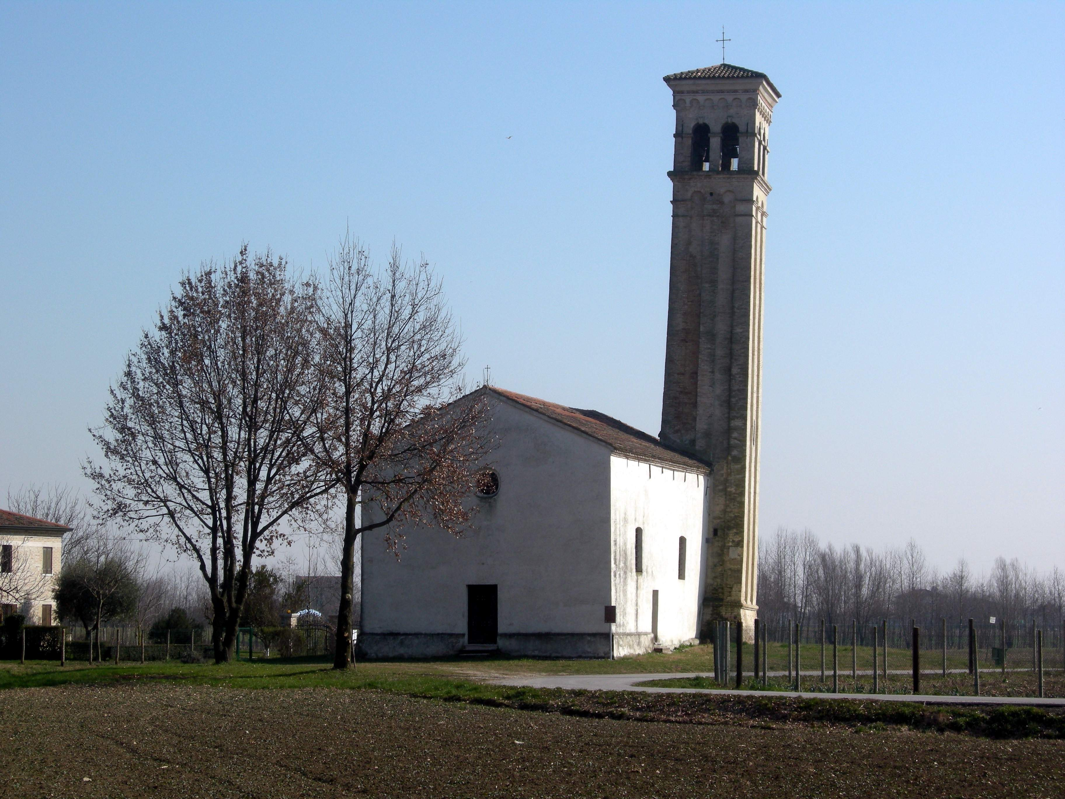 cervellin, opera propria, chiesa di S.ta Maria di Castello di Biancade, licenza GFDL, feb. 2009